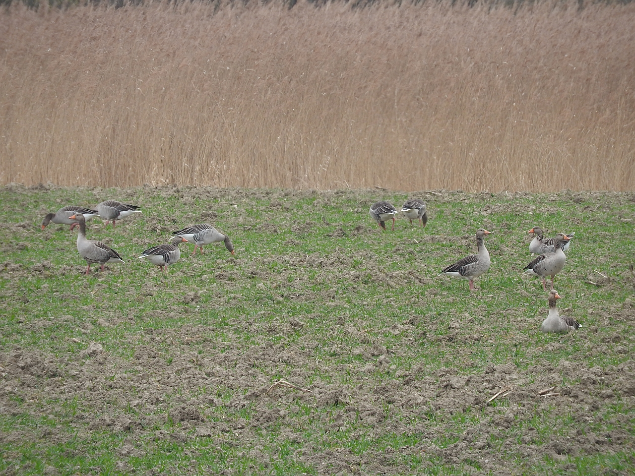 Graugänse im Naturschutzgebiet Altrhein-Königsee, 20.03.2016